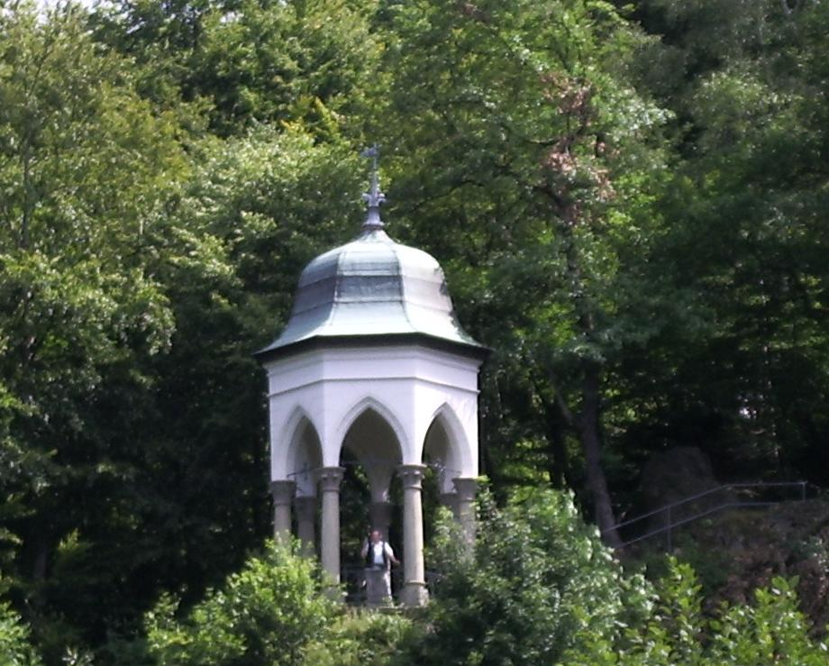 Diederichstempel